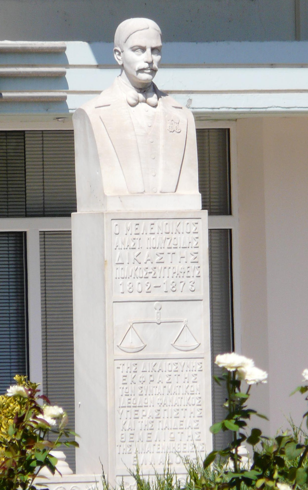 бюст-паметник на Анастасиос Полизоидис във Валовища (Сидирокастро).